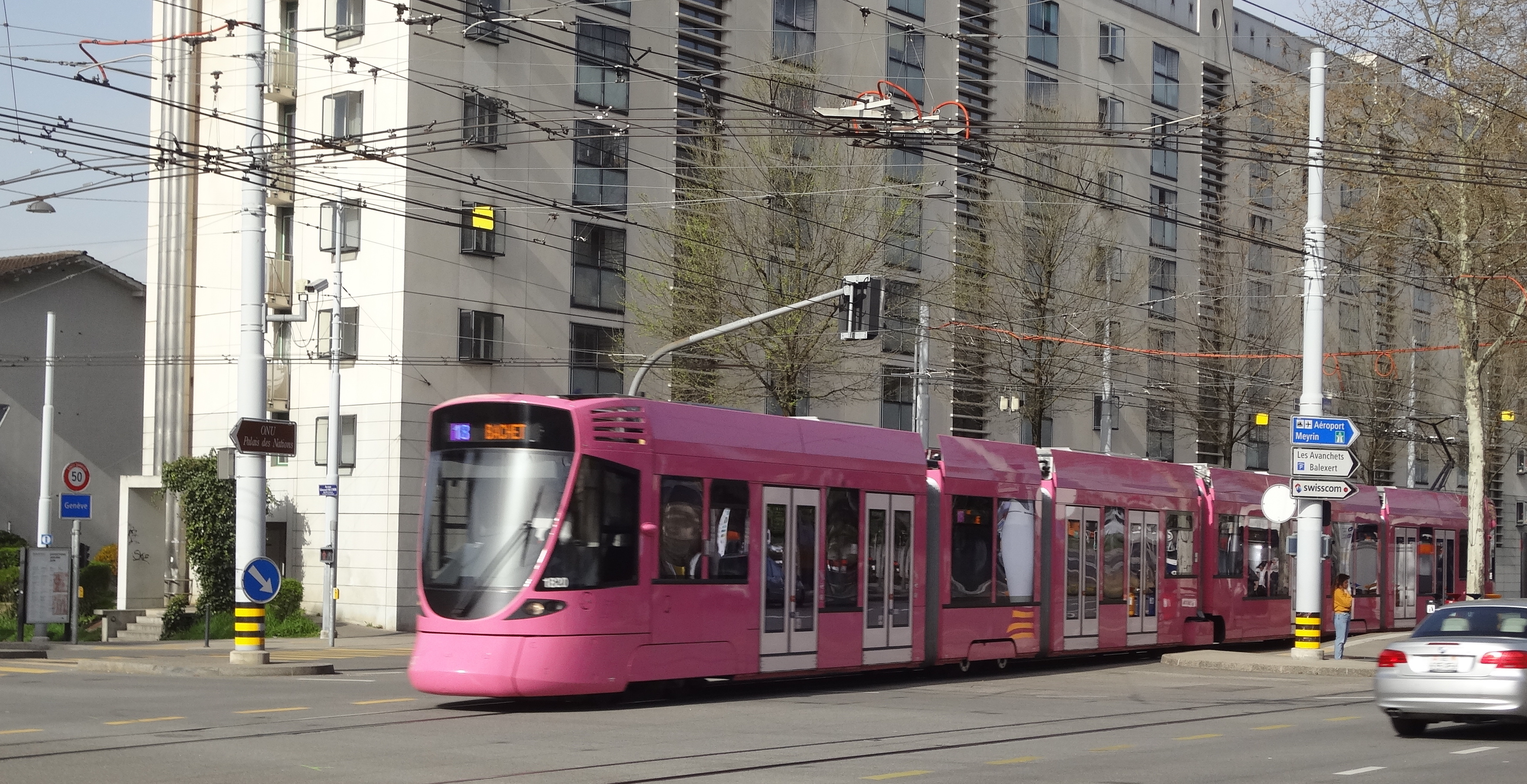 Tram Rose à la place du Bouchet (limite de la commune de Vernier).